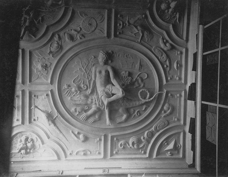 Utsnitt av stukktak fra Kongens gate 5 i Christiania. taket er datert 1662 og fremstiller de den gang kjente fire verdensdeler. Taket er trolig utført av dønnikmester Jens jensen Vind, og ble da huset ble revet i 1898 flyttet og montert i Bysamlingen på Norsk Folkemuseum. Billedsamlingen Oslo Museum, Fotografert ca. 1898, fotograf ukjent.